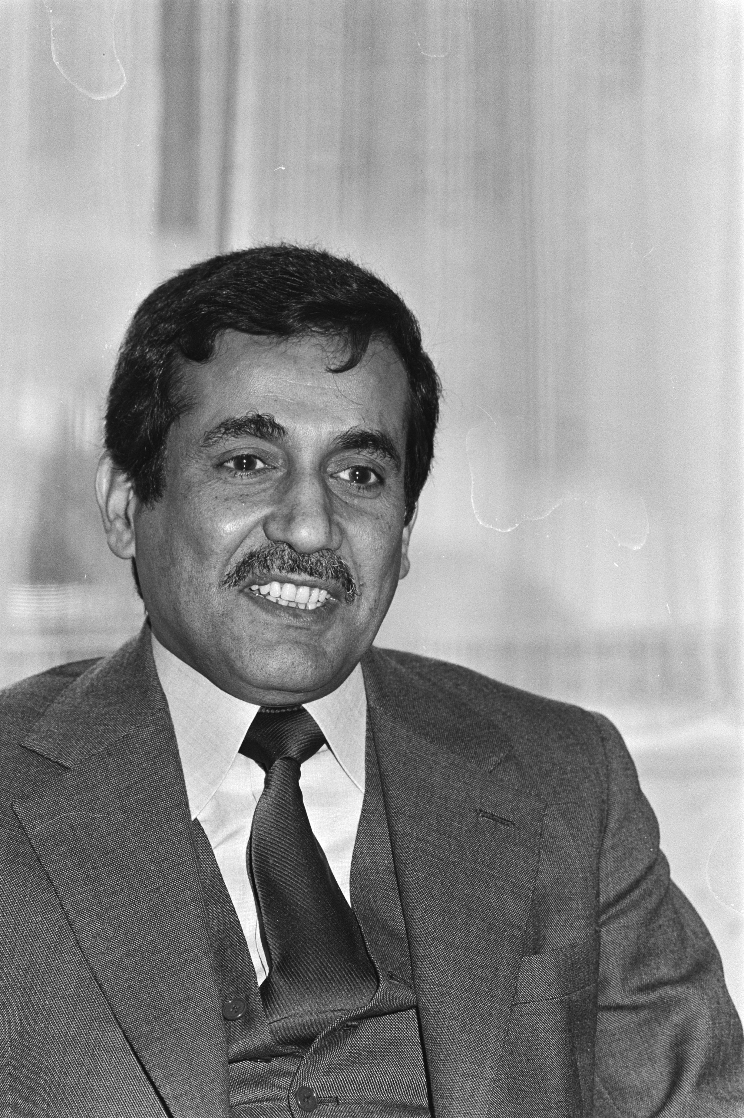 Collectie / Archief : Fotocollectie Anefo Reportage / Serie : [ onbekend ] Beschrijving : Aankomst op Schiphol van Sjeik Abal A Khail , minister van financien en EZ van Saoedi Arabie ; Abal A Khail (kop) Datum : 5 februari 1979 Trefwoorden : aankomsten, ministers, vliegvelden Fotograaf : Dijk, Hans van / Anefo Auteursrechthebbende : Nationaal Archief Materiaalsoort : Negatief (zwart/wit) Nummer archiefinventaris : bekijk toegang 2.24.01.05 Bestanddeelnummer : 930-1080 Reacties Geplaatst door Tekstman op 27 september 2014 - 08:25. Mohammed Aba Al-Khail